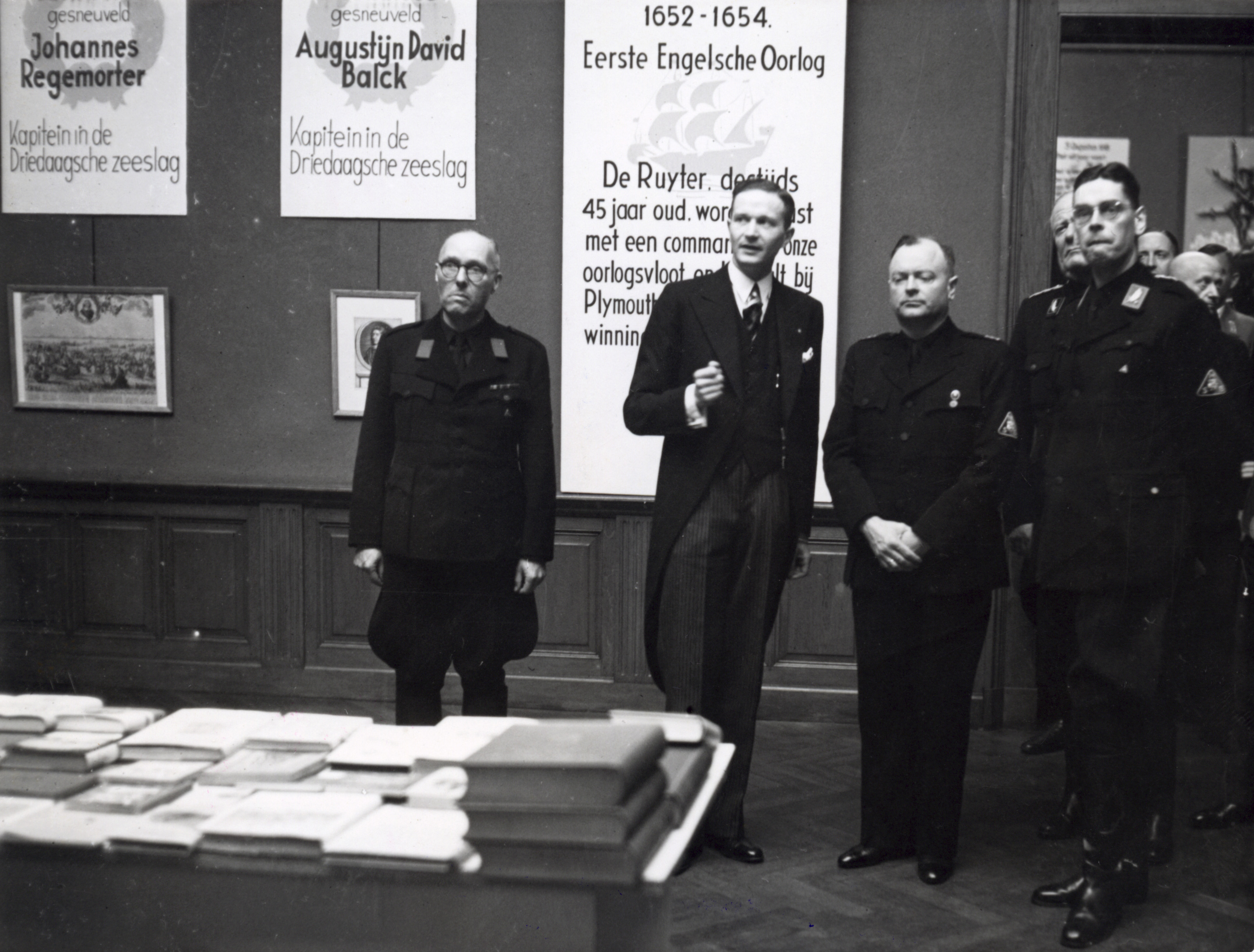 Tijdens de Tweede Wereldoorlog. Anton Mussert, leider van de Nationaal- Socialistische Beweging in Nederland, tijdens een rondgang in het Rijksmuseum in Amsterdam van de "De Ruyter Tentoonstelling". Rechts Prof. Dr. T. Goedewaagen, links de organisator v.d. tentoonstelling Dhr. Wild. Nederland, 19 juni 1942.